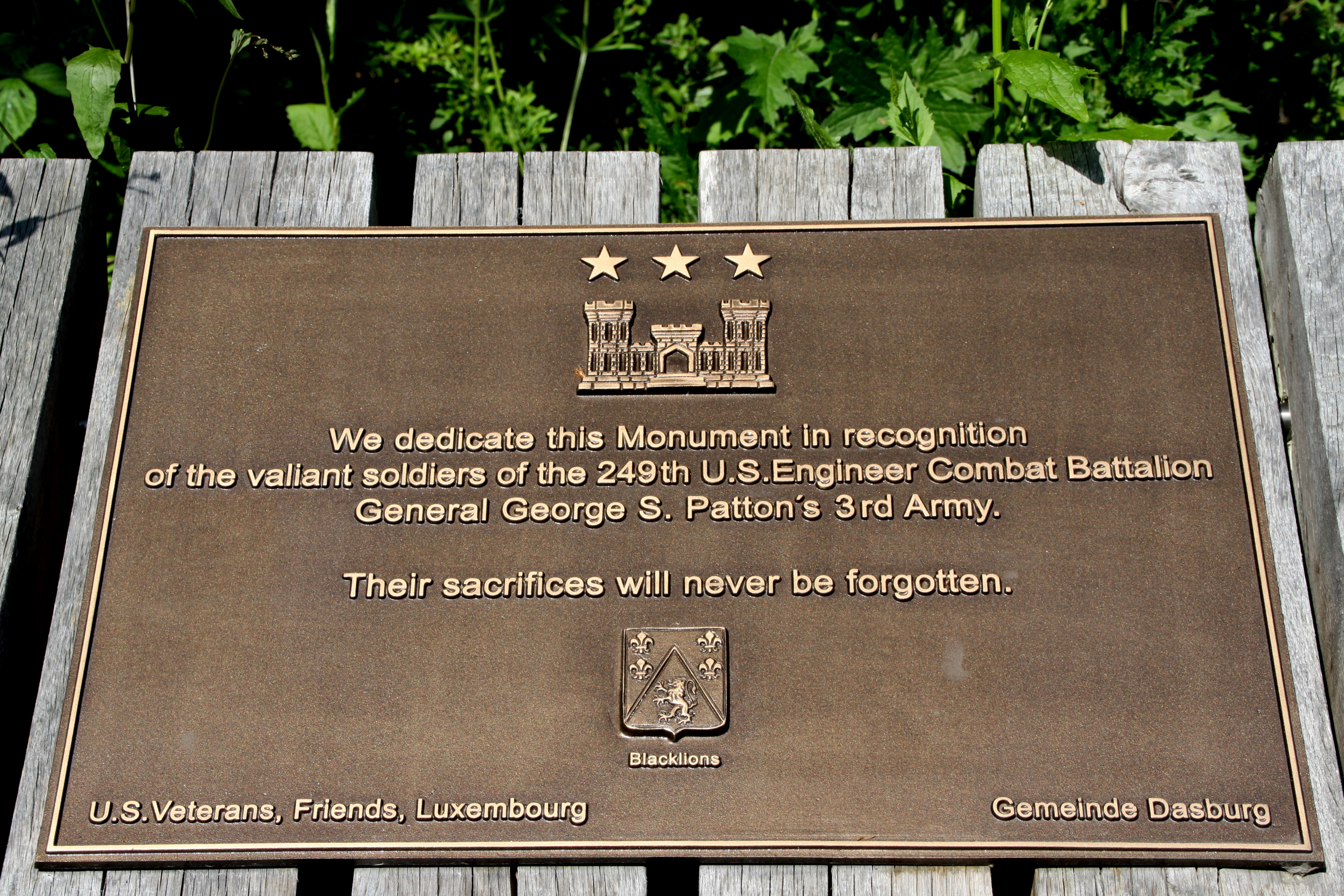 Plackett bei der Bréck vun Doosber